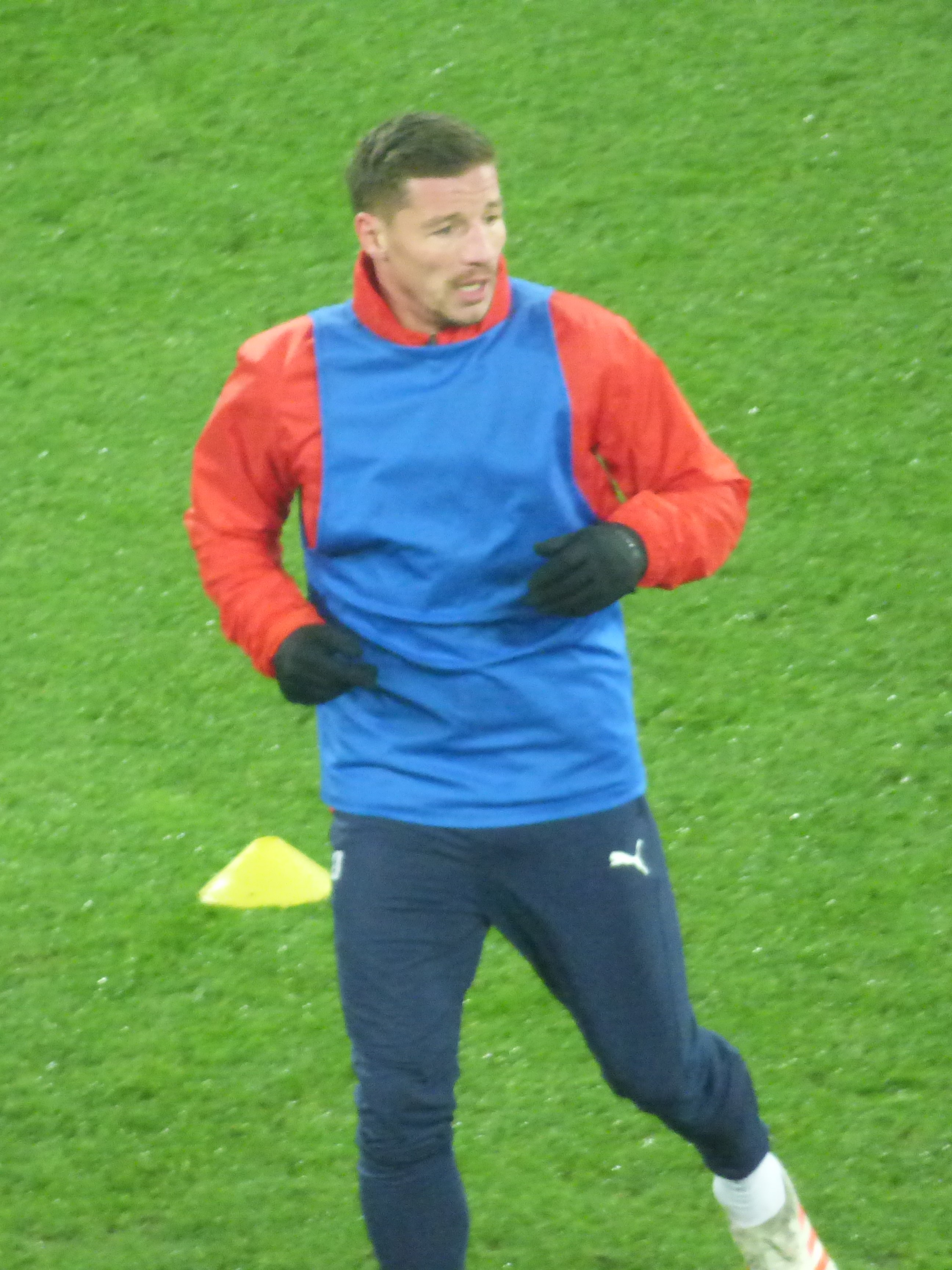 Mehdi Mostefa avant le match RC Lens / AS Béziers, comptant pour la 23ème journée du championnat de France de football de Ligue 2 2018-2019, le 4 février 2019, au Stade Bollaert-Delelis.